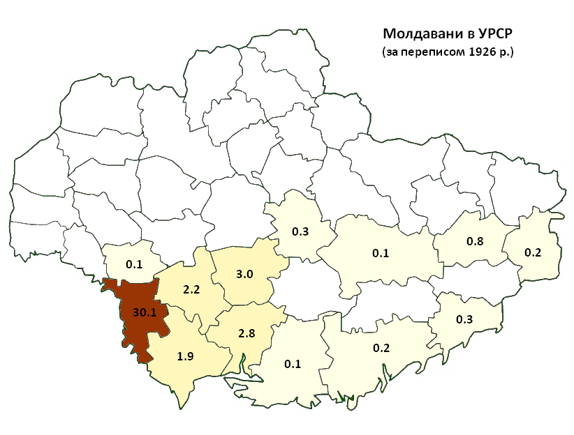 Розселення молдаван в УРСР за даними перепису 1926 р. / Moldovans in Ukrainian SSR according to 1926 census